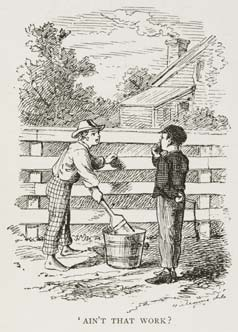 Tom Sawyer lurer en kompis til å male for seg. Af Mark Twain (1835-1910).